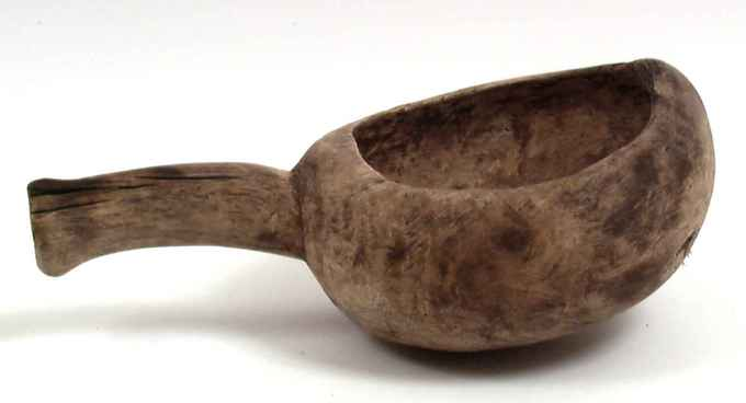 Samisk melkebolle eller nahppi, innkommet fra Kautokeino i Finnmark i 1932. Foto Anne-Lise Reinsfelt / Norsk Folkemuseum, NFSA.1734.